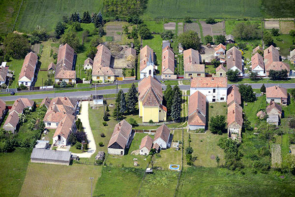 Várkesző